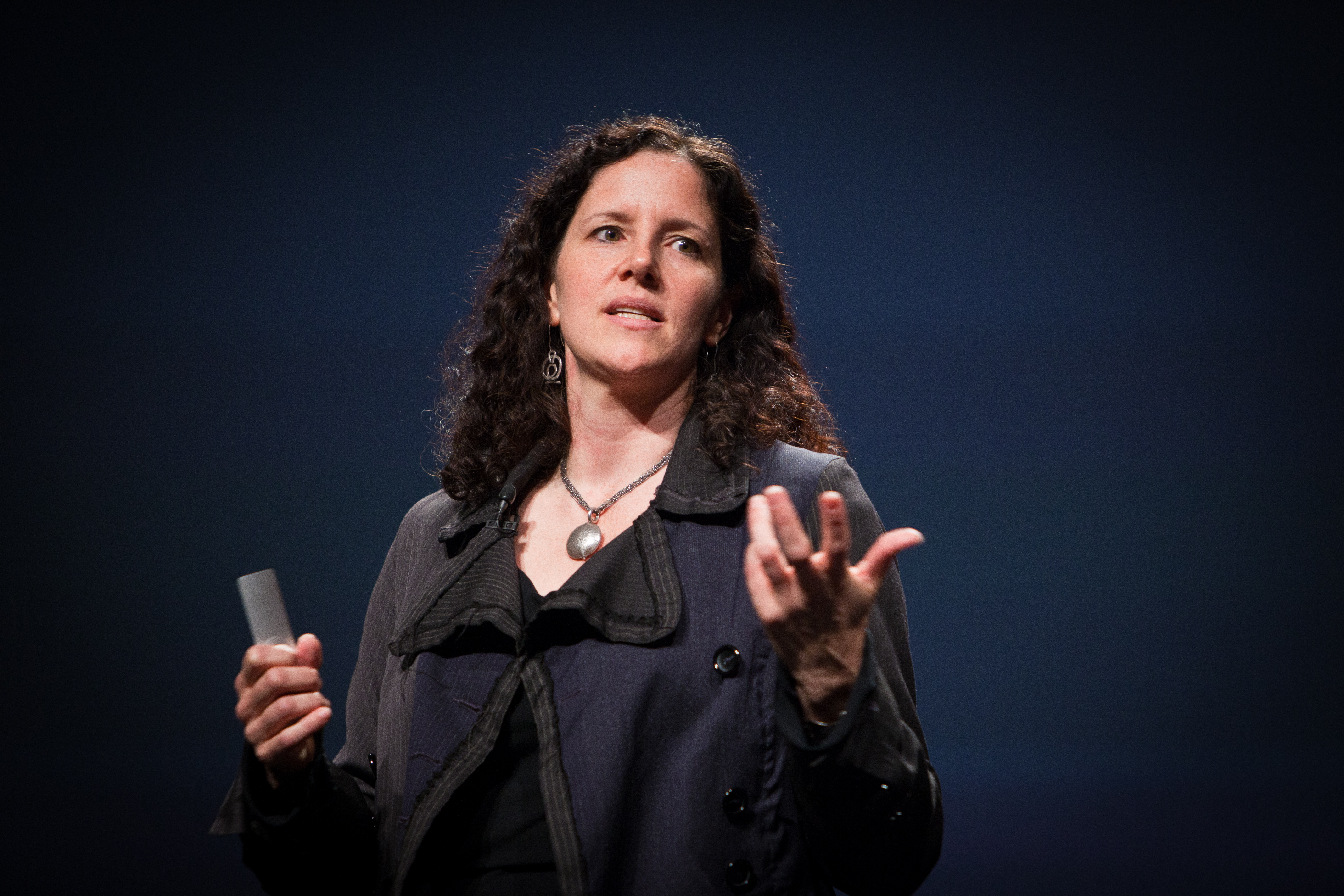 Photo: Kris Krüg